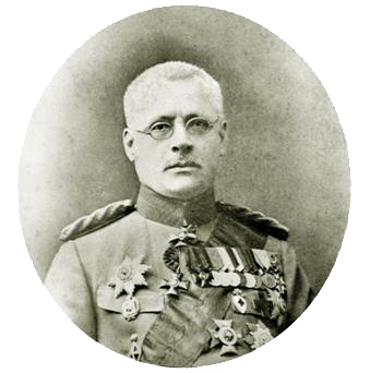 Приамурский генерал-губернатор Николай Львович Гондатти